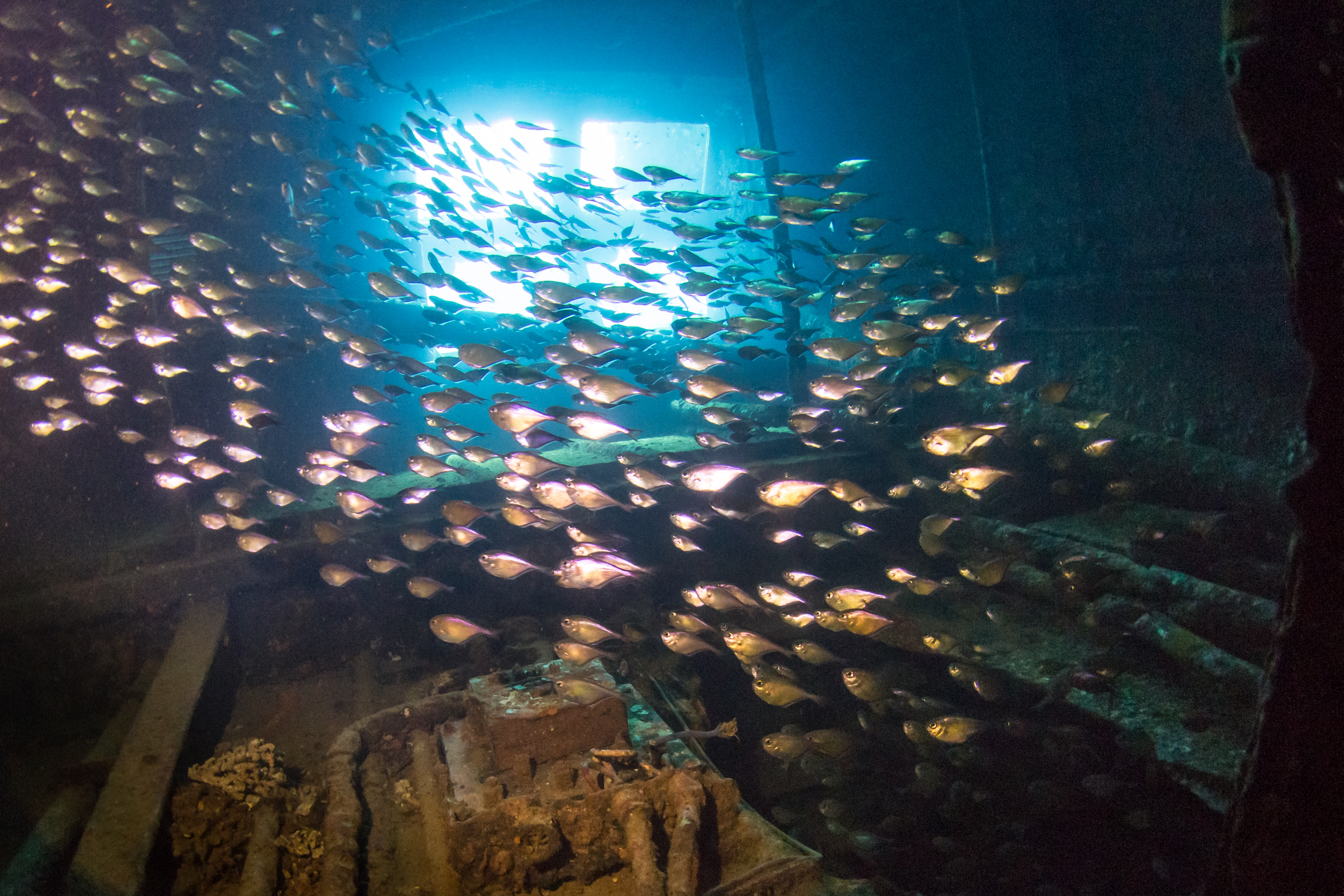 Schiffswrack Giannis D mit Fischen Pempheris adusta, Rotes Meer, Ägypten